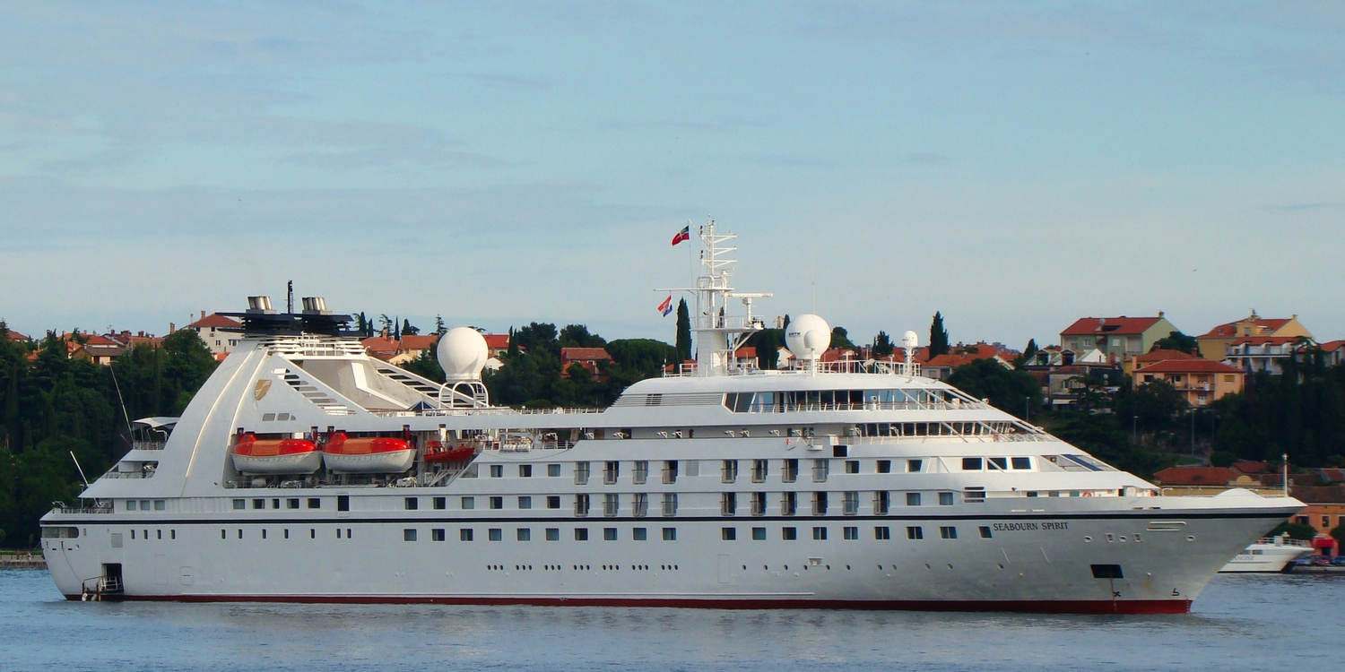 Seabourn Spirit a Rovigno, Croazia